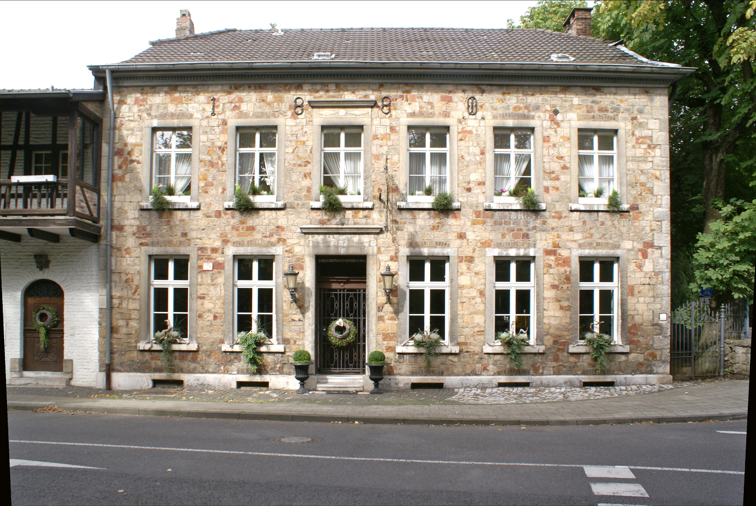 Roetgen-Mulartshütte Zweifaller Strasse 37This is a photograph of an architectural monument., no. 24